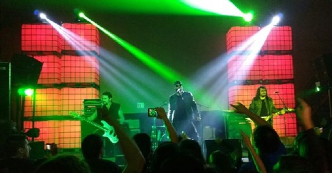 Concierto Dark Moor